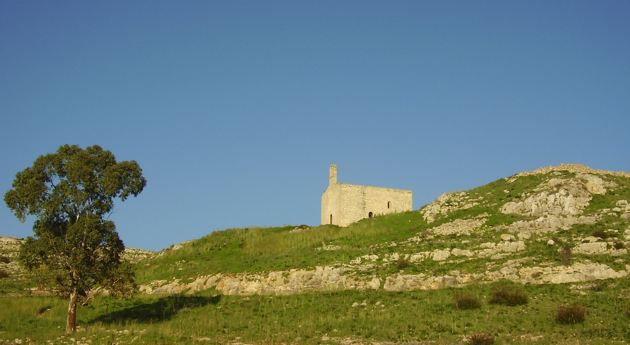 Rupi di San Mauro Sannicola, Lecce